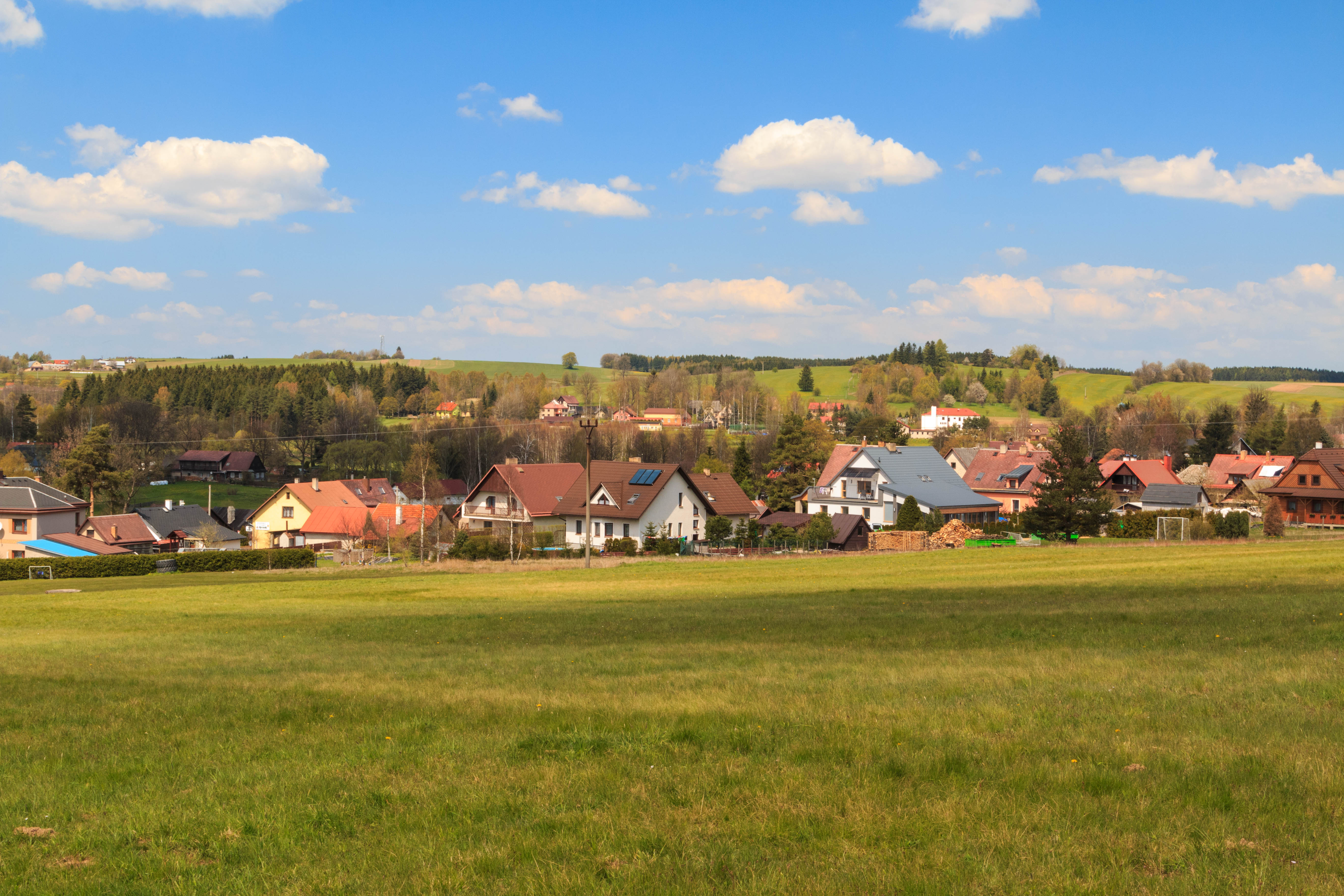 PR Volákův kopec Project: Chráněná území.